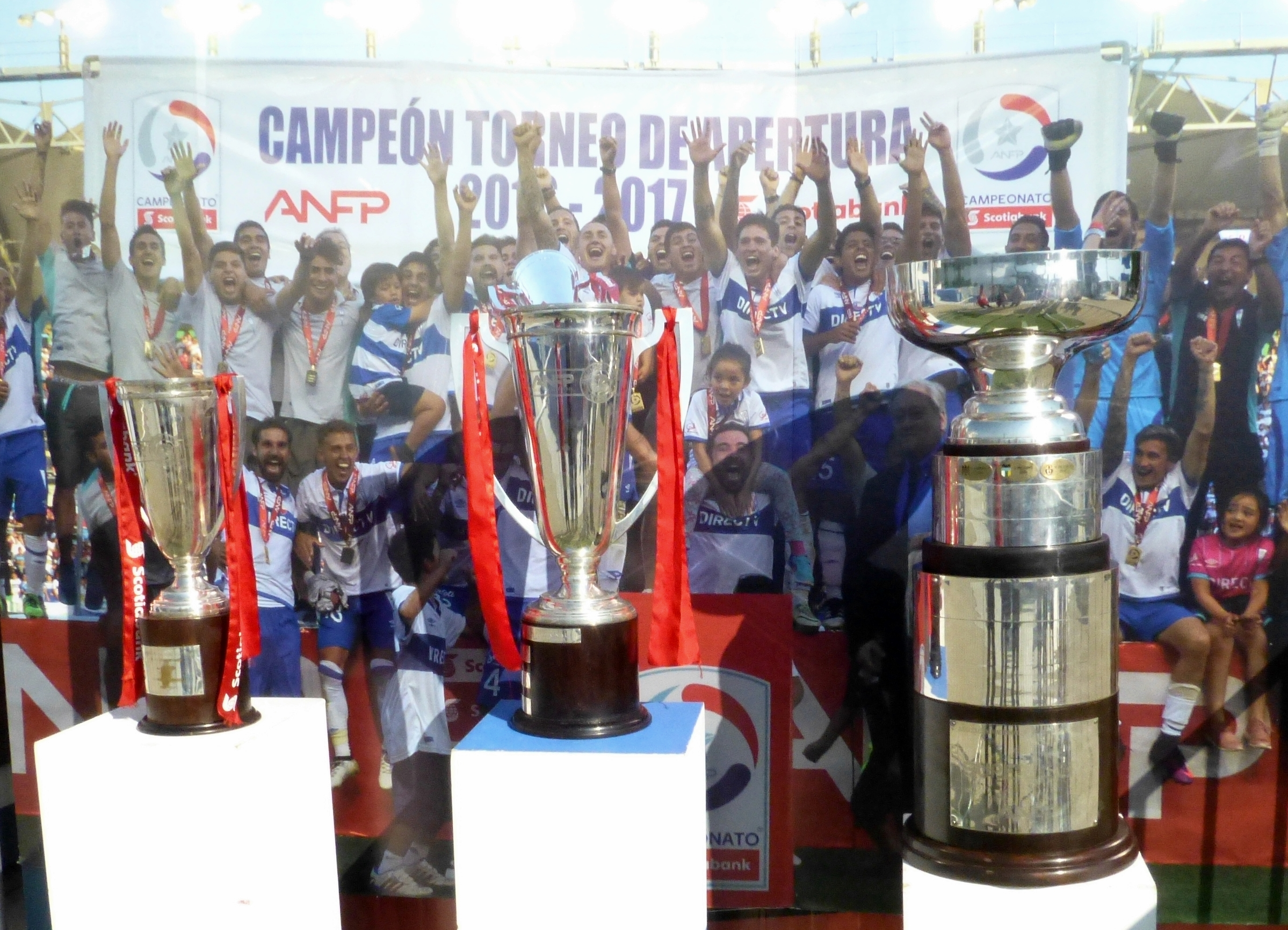 Trofeos del Clausura 2016 (réplica del Huemul de Plata), Huemul de Plata correspondiente a la obtención del Apertura 2016 y Supercopa de Chile